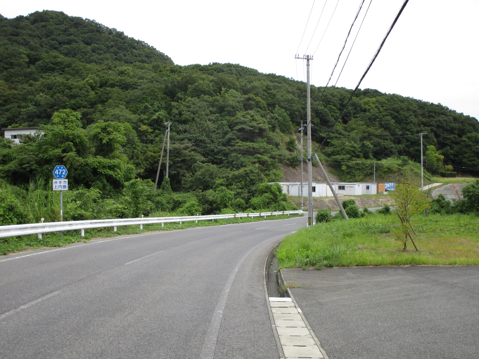 兵庫県道472号鳥飼浦洲本線（平成16年台風23号 洲本市上内膳・納地区災害復旧事業竣工記念の碑付近より撮影）